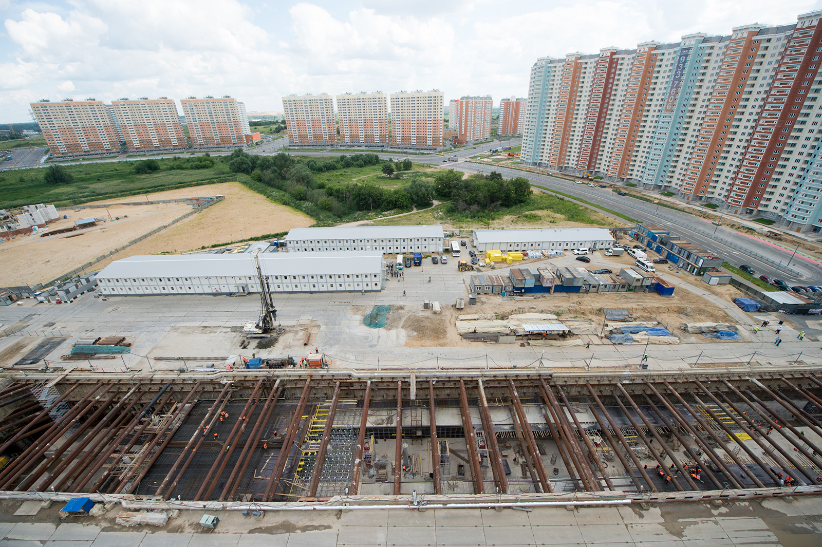 Строительство станции «Некрасовка» Кожуховской линии метрополитена (июнь 2016 года).